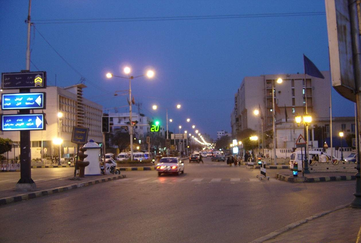 إحدى شوارع مدينة بنها